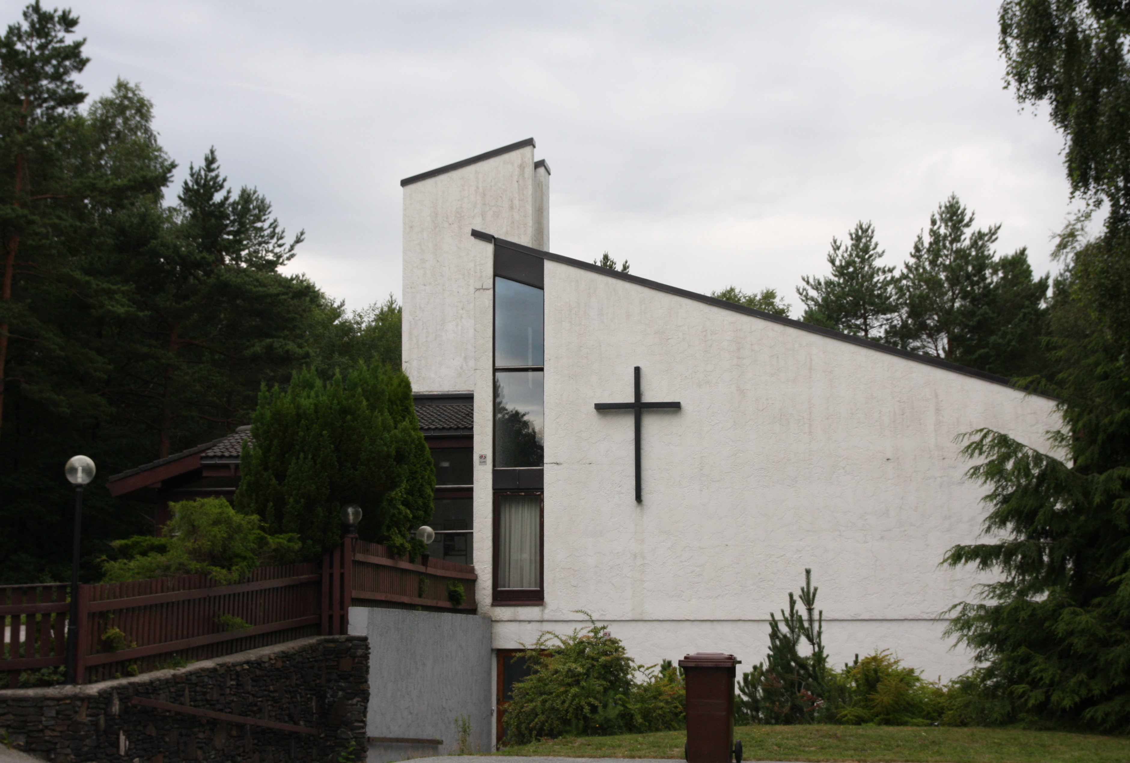 Langenes arbeidskirke, Søgne